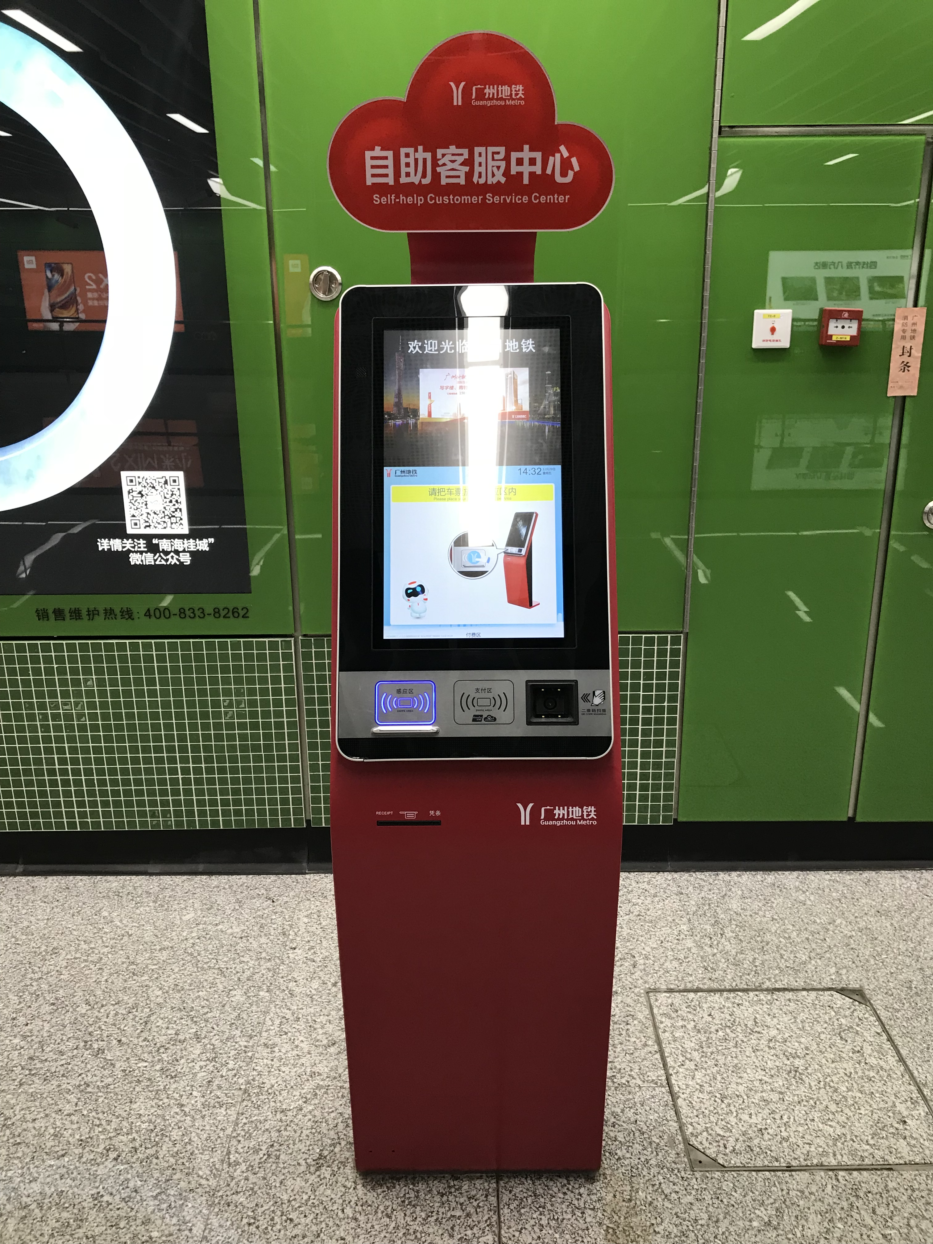 广州地铁大涌站自助客服中心